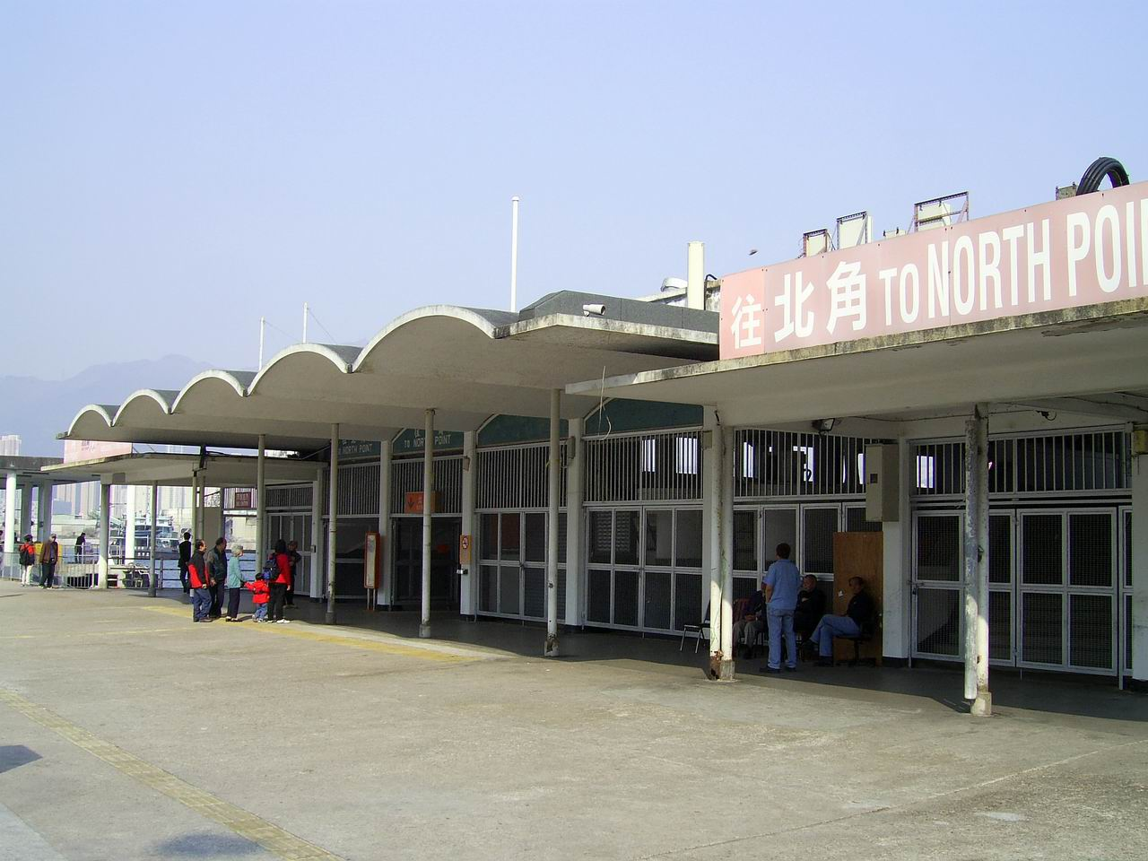 九龍城碼頭